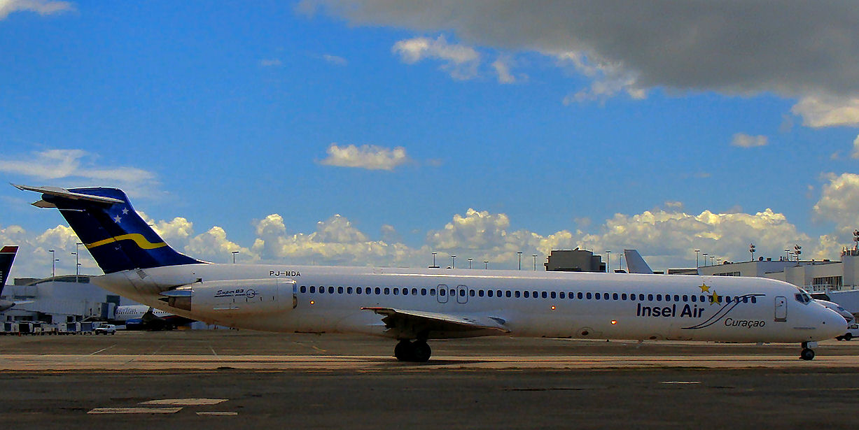 San Juan - Luis Muñoz Marin International (SJU/TJSJ) - Puerto Rico 6-21-2009 Photo: Tomás Del Coro